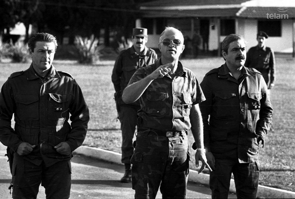 Aldo Rico, cabecilla de la rebelión carapintada en Campo de Mayo (16 al 19/04/87).